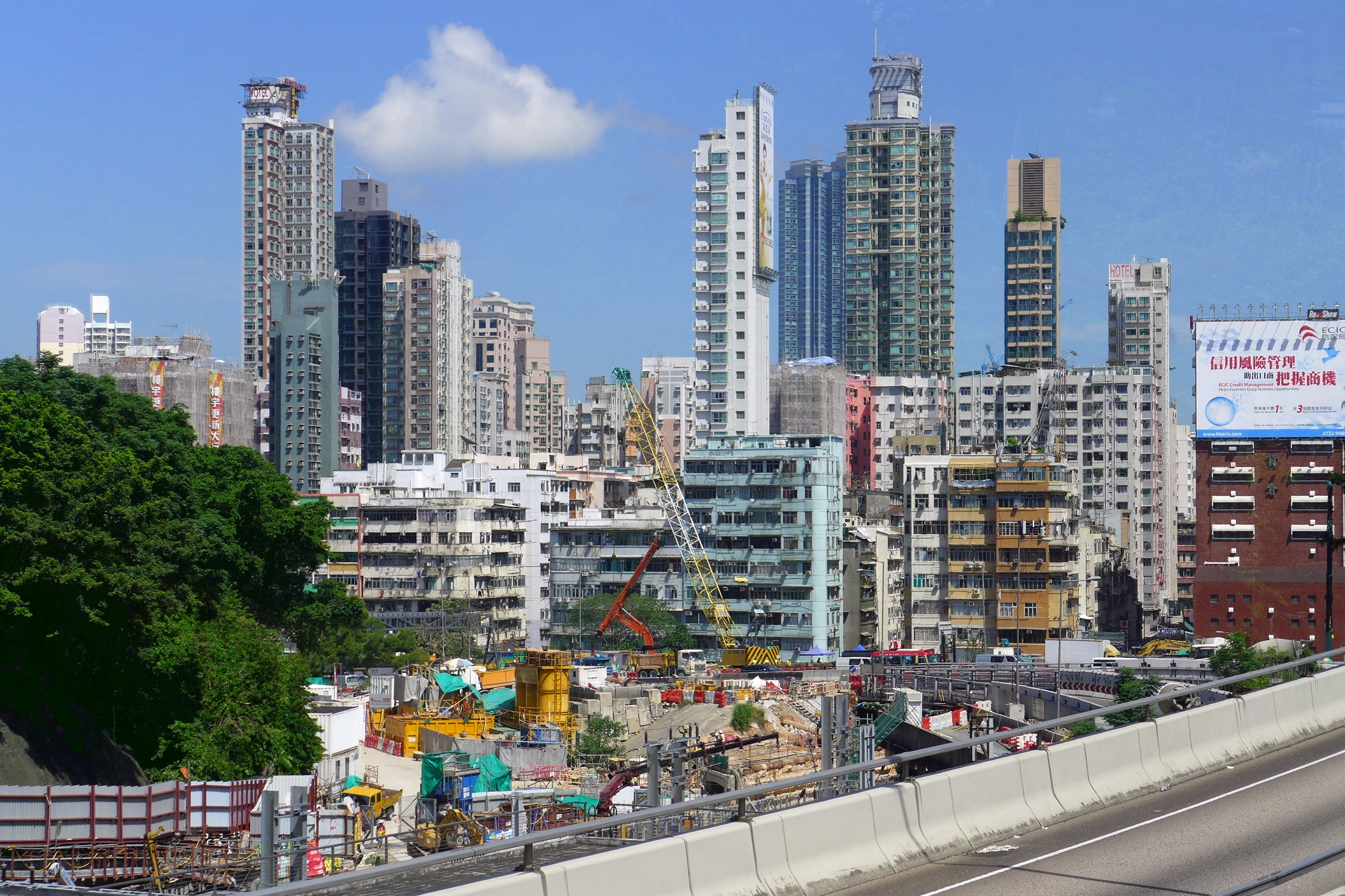 Buildings in Hung Hom